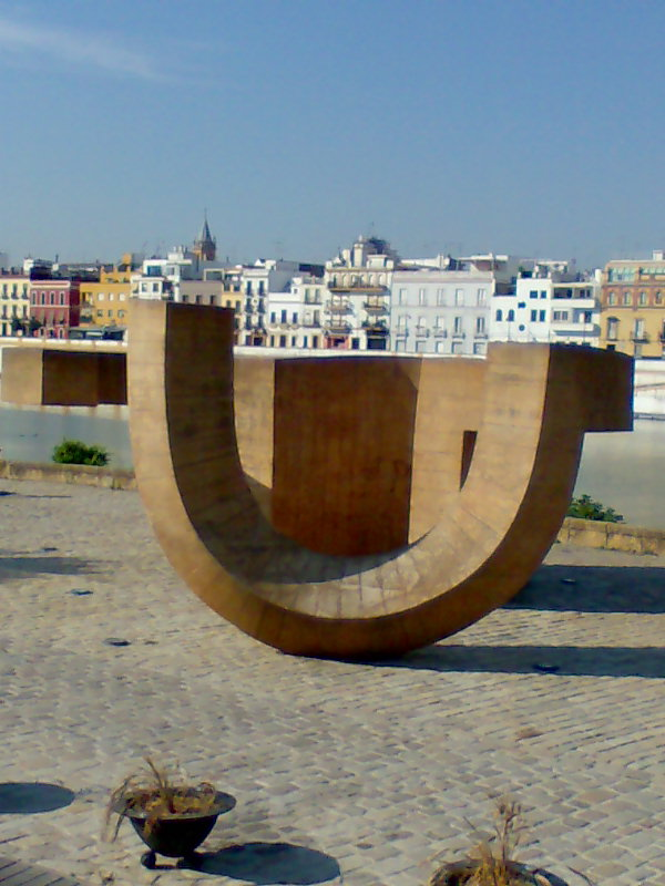 Monumento a la tolrancia Eduardo Chillida Sevilla 1992